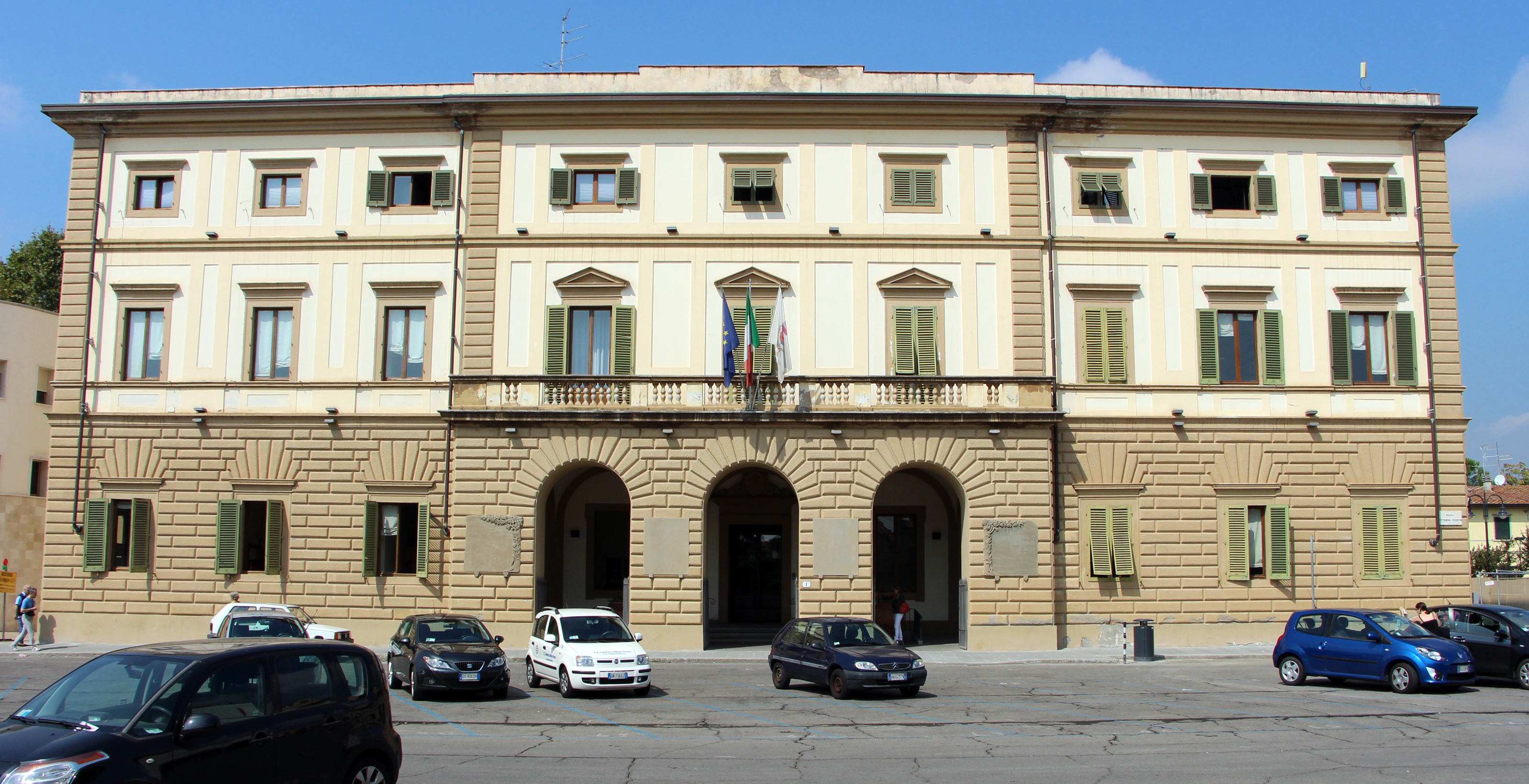 Sesto Fiorentino